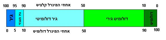 תרשים שמות סלע הדולומיט. בוצע על ידי באמצעות הצייר של windows.